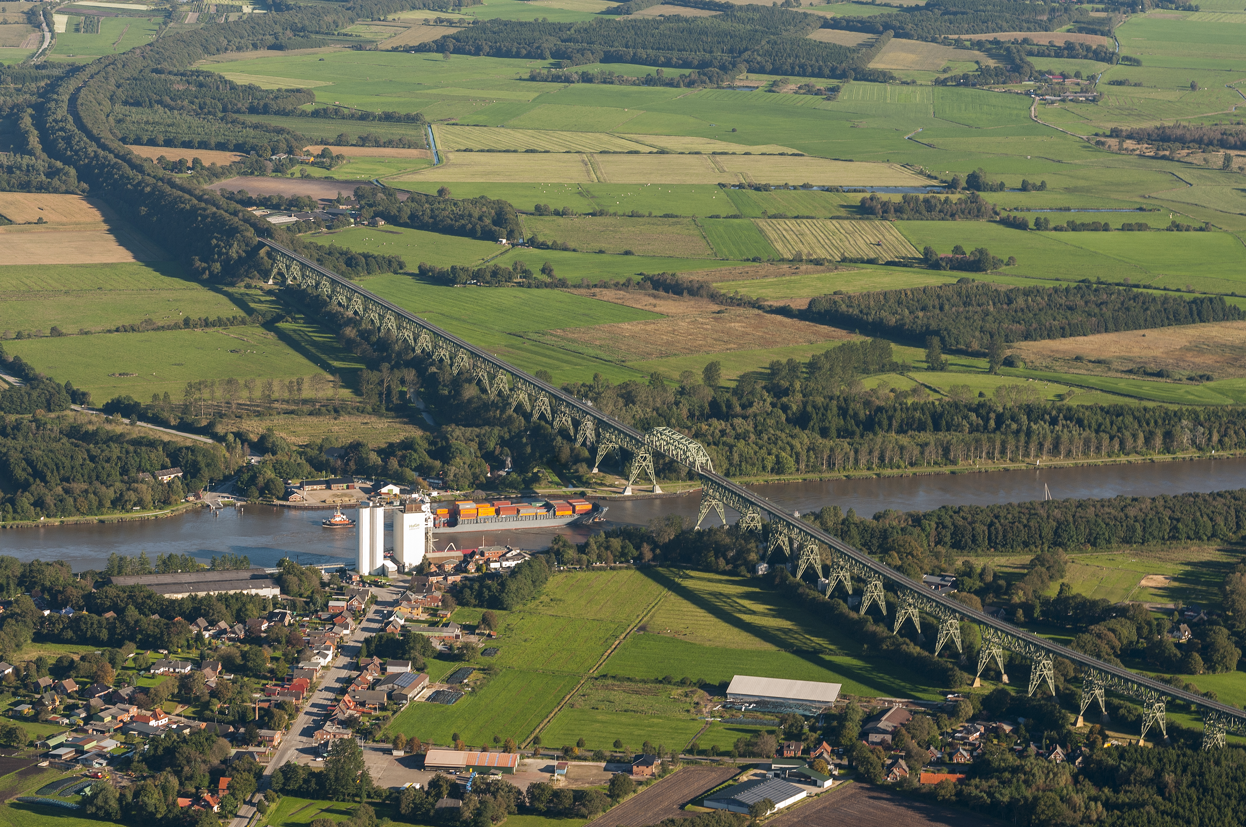 Fotoflug über das nordfriesische Wattenmeer, Hochbrücke Hochdonn